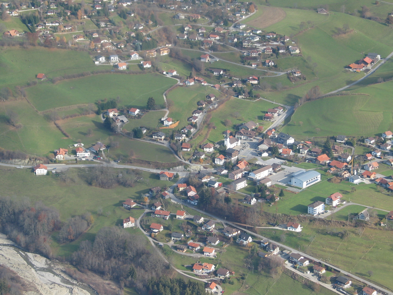 Flugaufnahme des Dorfes Plasselb